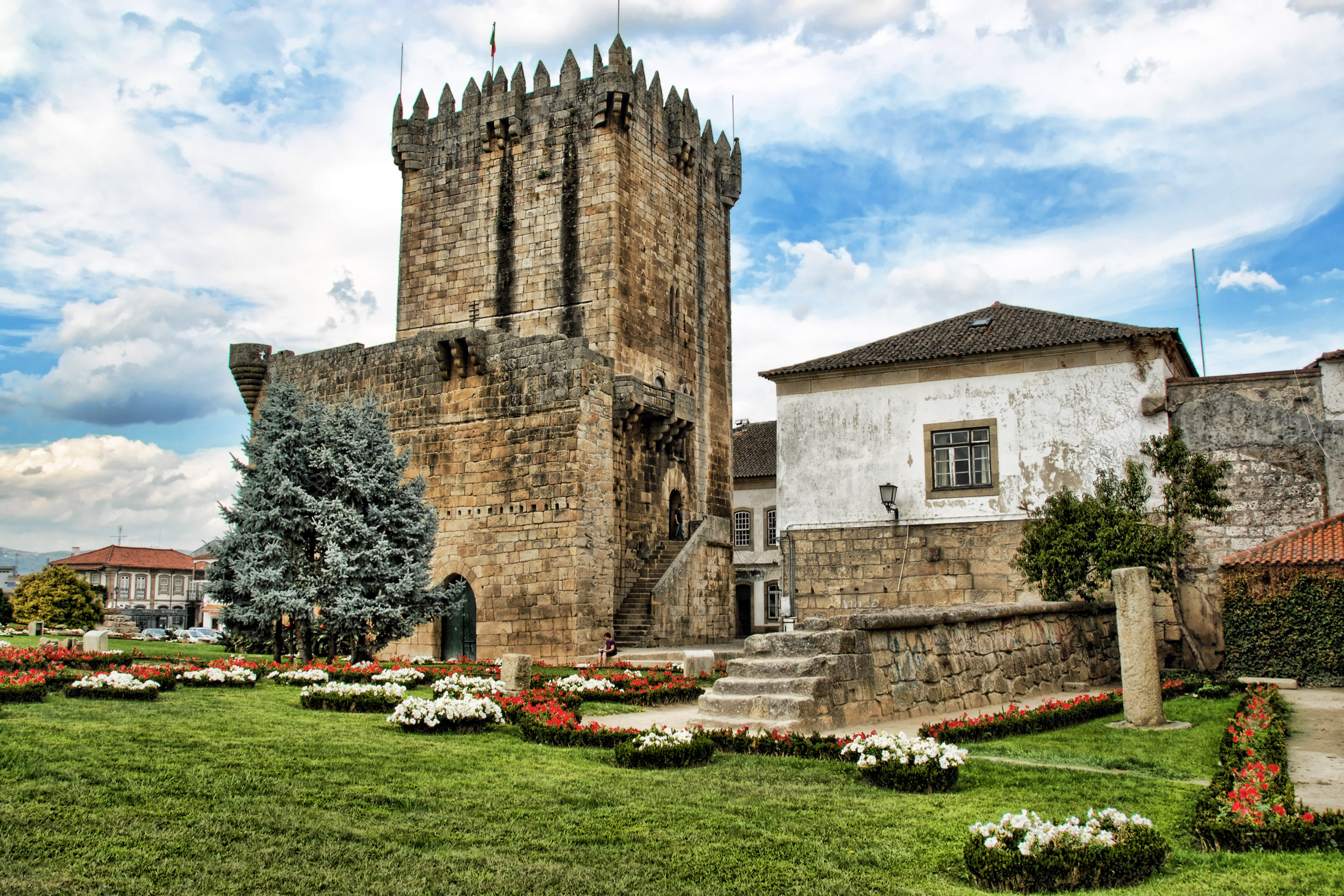 Castelo ou Forte de Chaves This file was uploaded for Wiki Loves Monuments in Portugal with the unique identifier 70655.